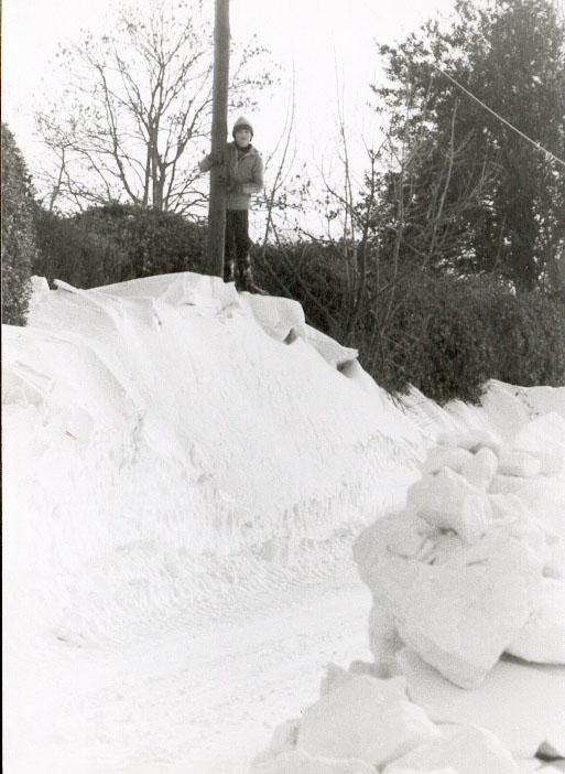 L' hiver 1954 des congères ont isolé le village ; tous les hommes réunis ont mis plusieurs jours pour les dégager à la pelle.